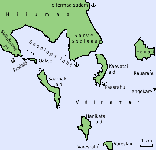 Kaart Heltermaalt Vareslaiuni.